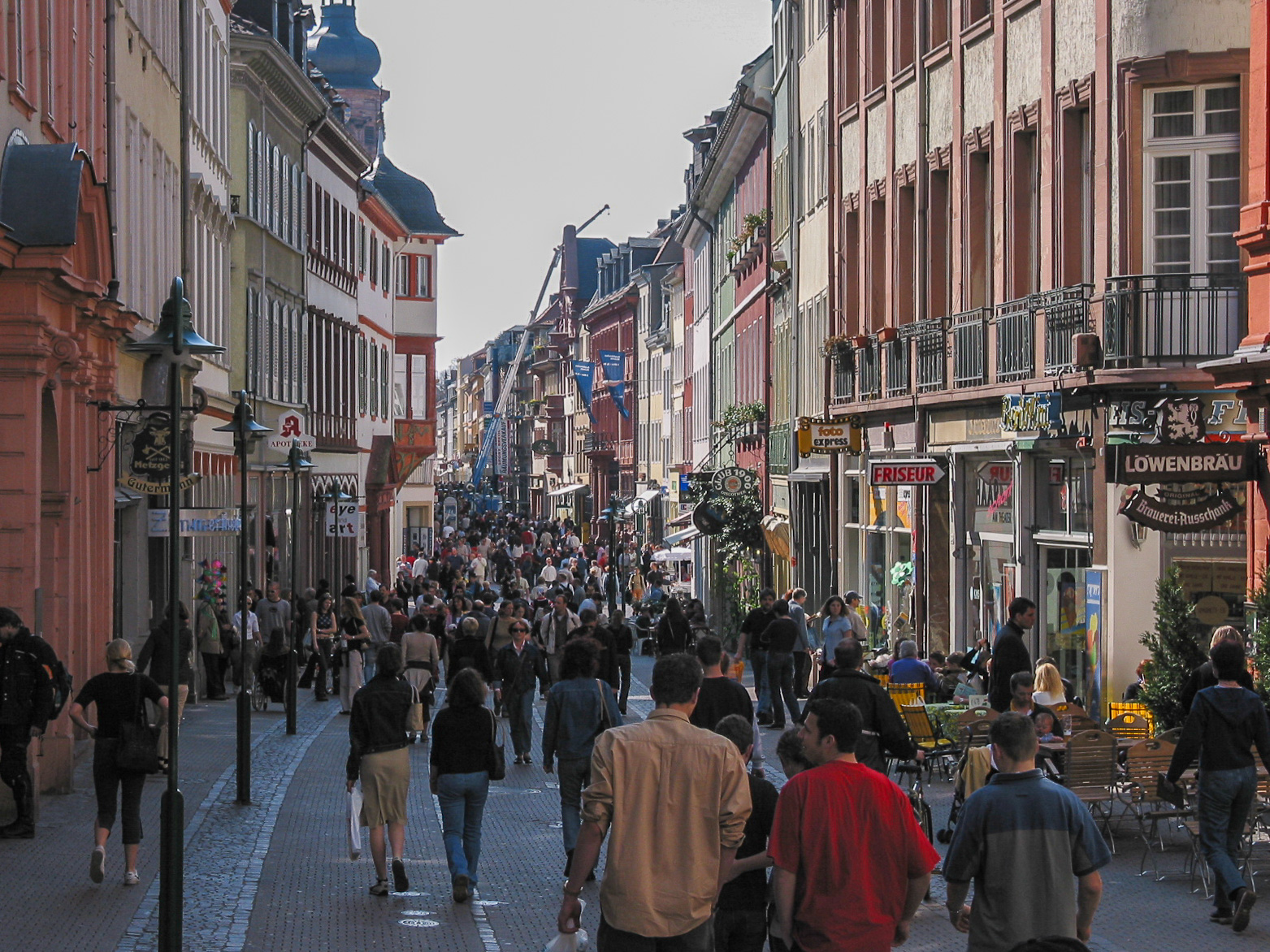 Blick in die Hauptstraße in Richtung Westen, etwas westlich des Universitätsplatzes, Heidelberg